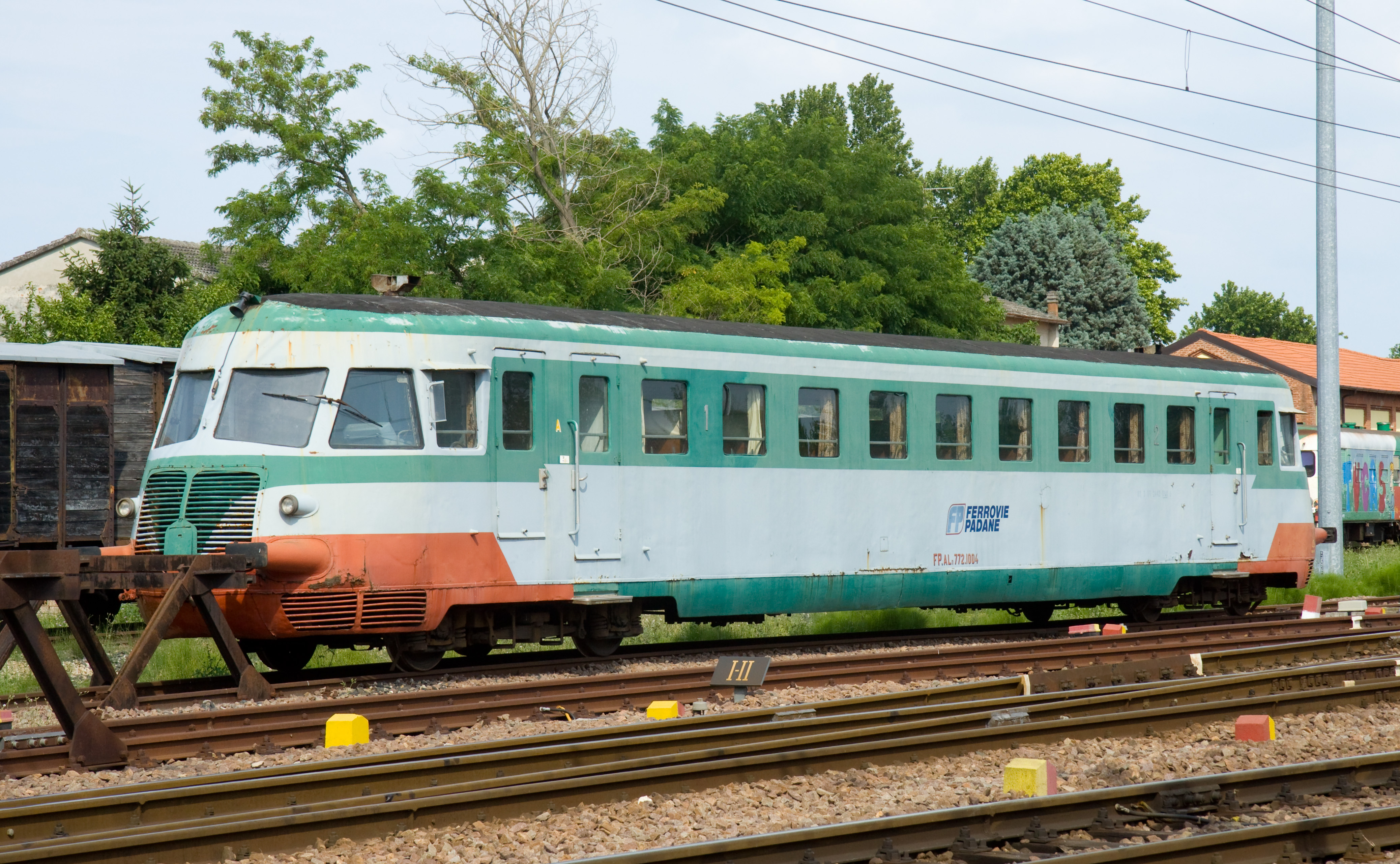 Automotrice ALn 772 delle Ferrovie Padane (FP), accantonata nella vecchia stazione di Sermide